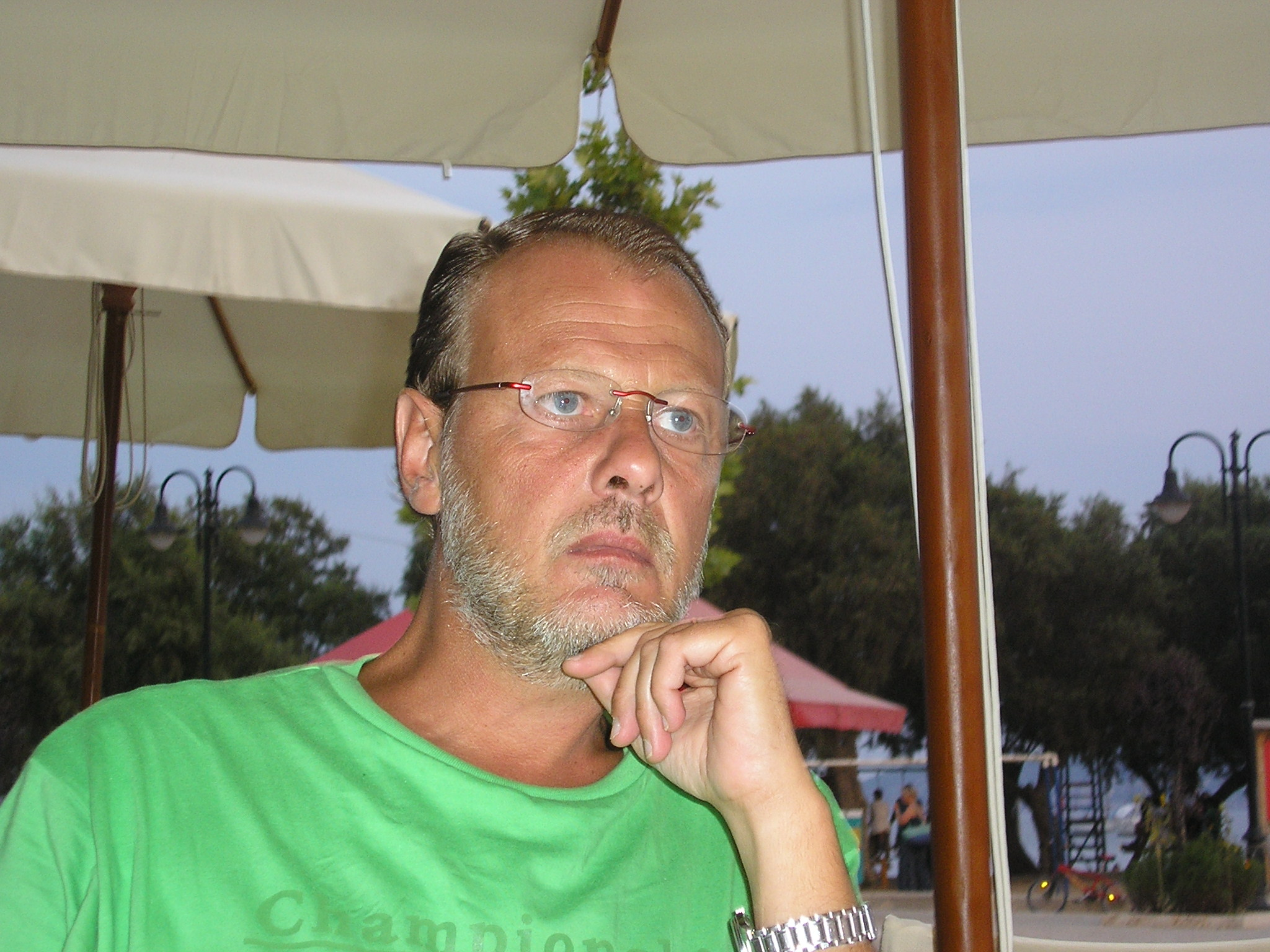 Andrea Carraro